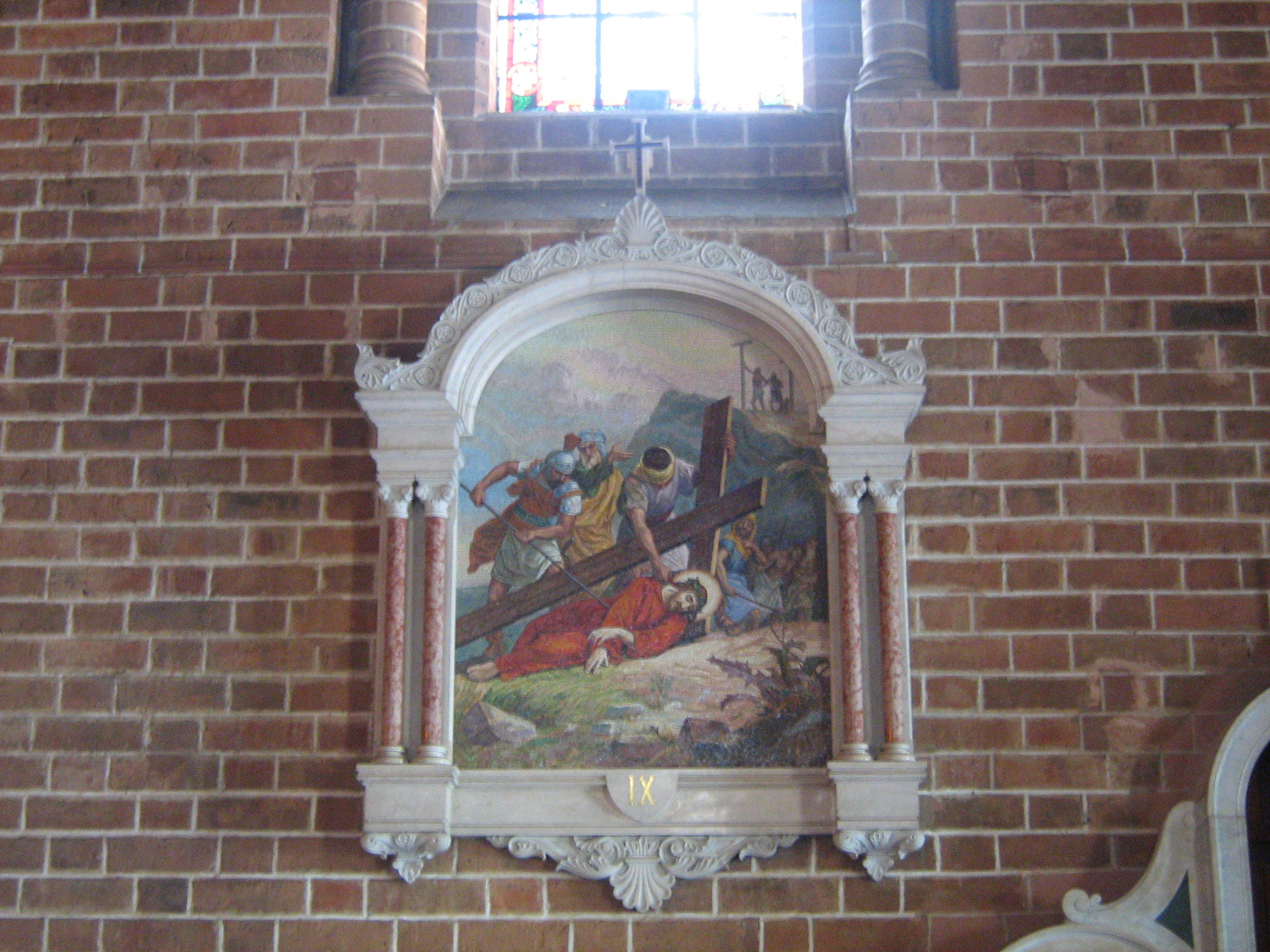 Estación IX del Viacrucis de la catedral Metropolitana de Medellín, Colombia.